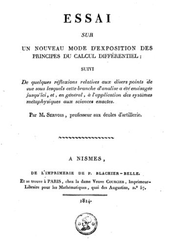 Porta del Essai (1814) de François-Joseph Servois (1767-1847)